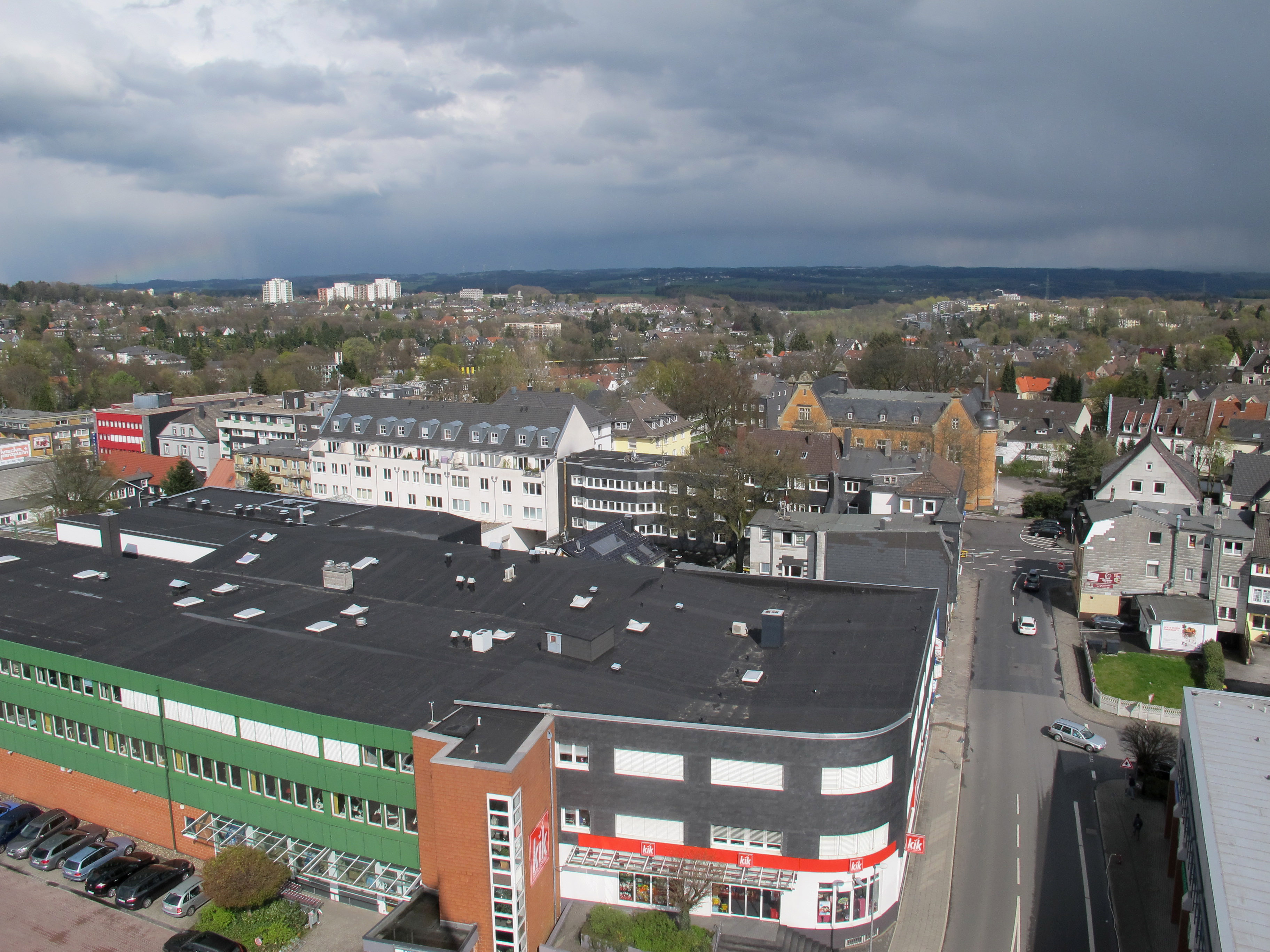 Lennep, Blick in Richtung Henkelshof